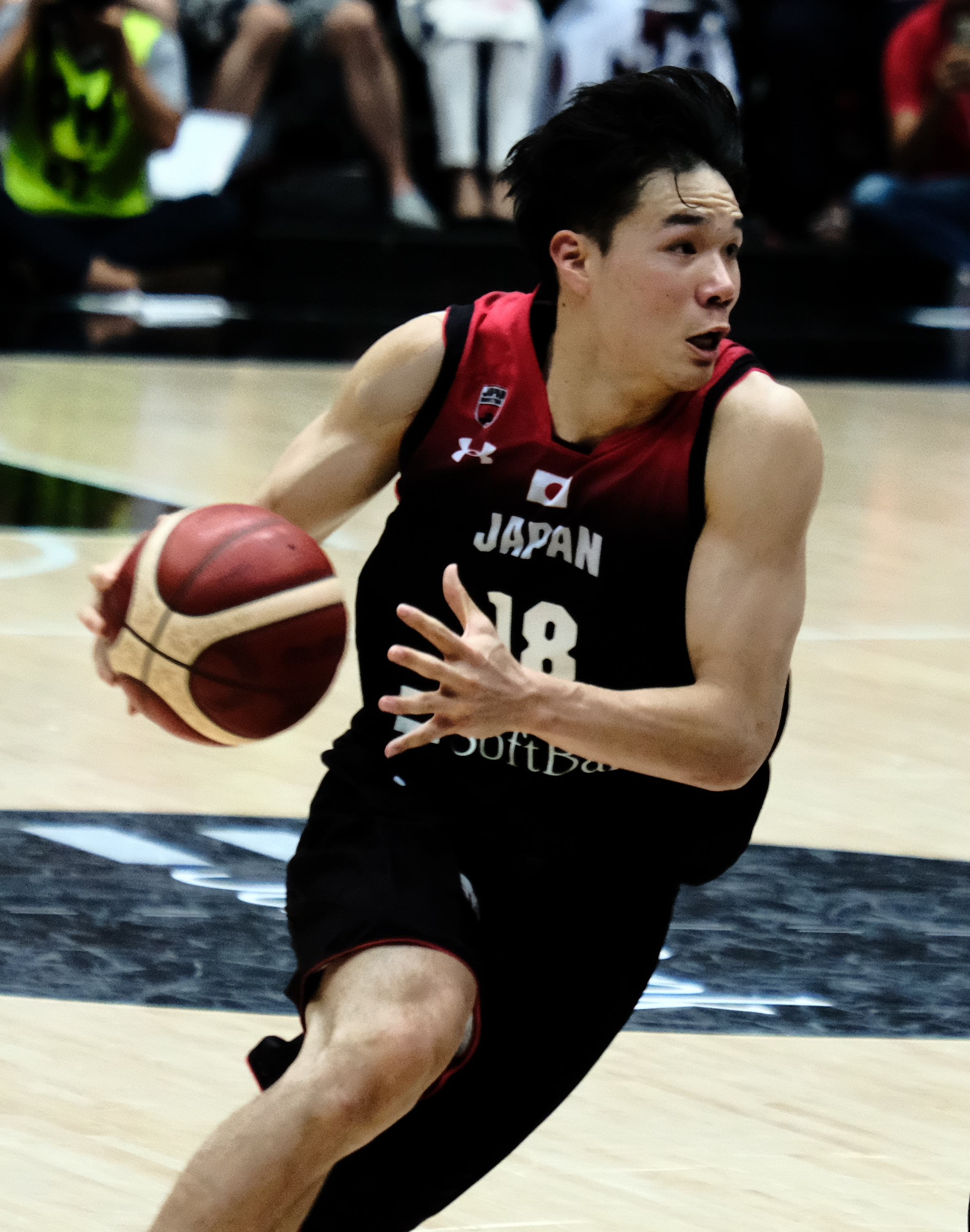 Basketball Japan vs Tunisia AkatsukiFive 20190825